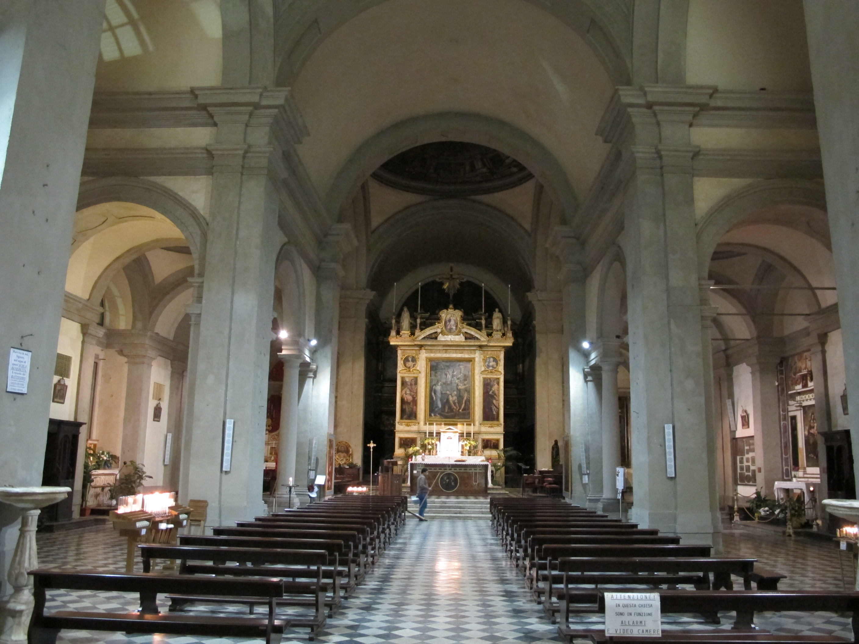 Badia delle sante flora e lucilla, arezzo, 04 interno